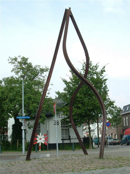 Kunstwerk, voor de Spoorlijn Eindhoven-Hasselt, van Theo Coenen op de Hoogstraat, hoek Hagenkampweg-Zuid in Eindhoven. 1992. Op de achtergrond het oude Spoorhuisje.